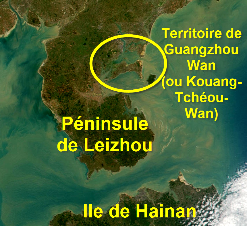 localisation de l'ancienne concession française du Kouang-Tchéou-Wan (ou "GuangzhouWan") - Fort Bayard